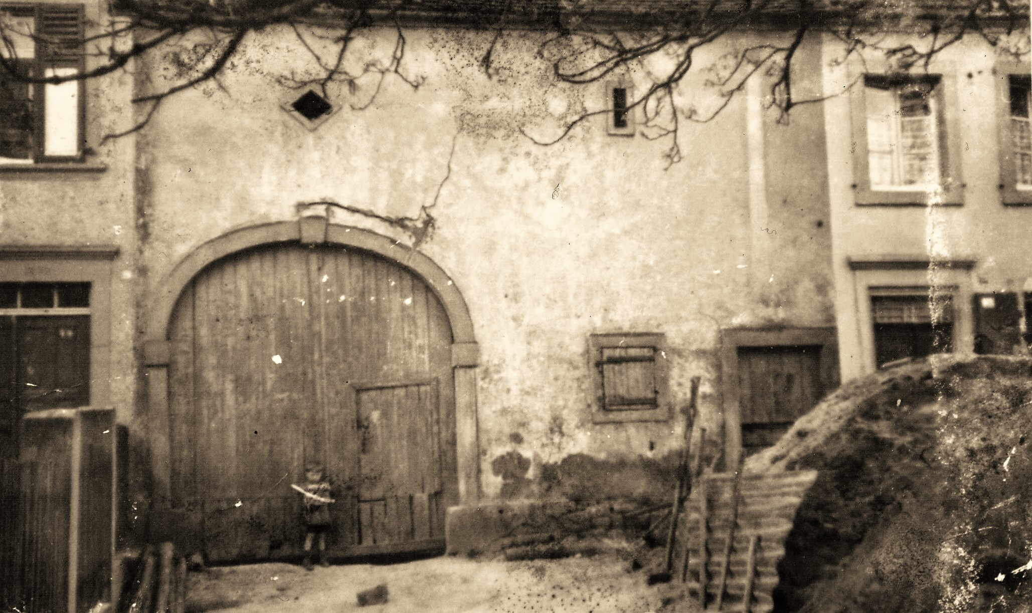 Herz-Mariae-Kloster (Diefflen), Scheunentrakt des Bauernhauses auf der Schnurr (Beckinger Straße)